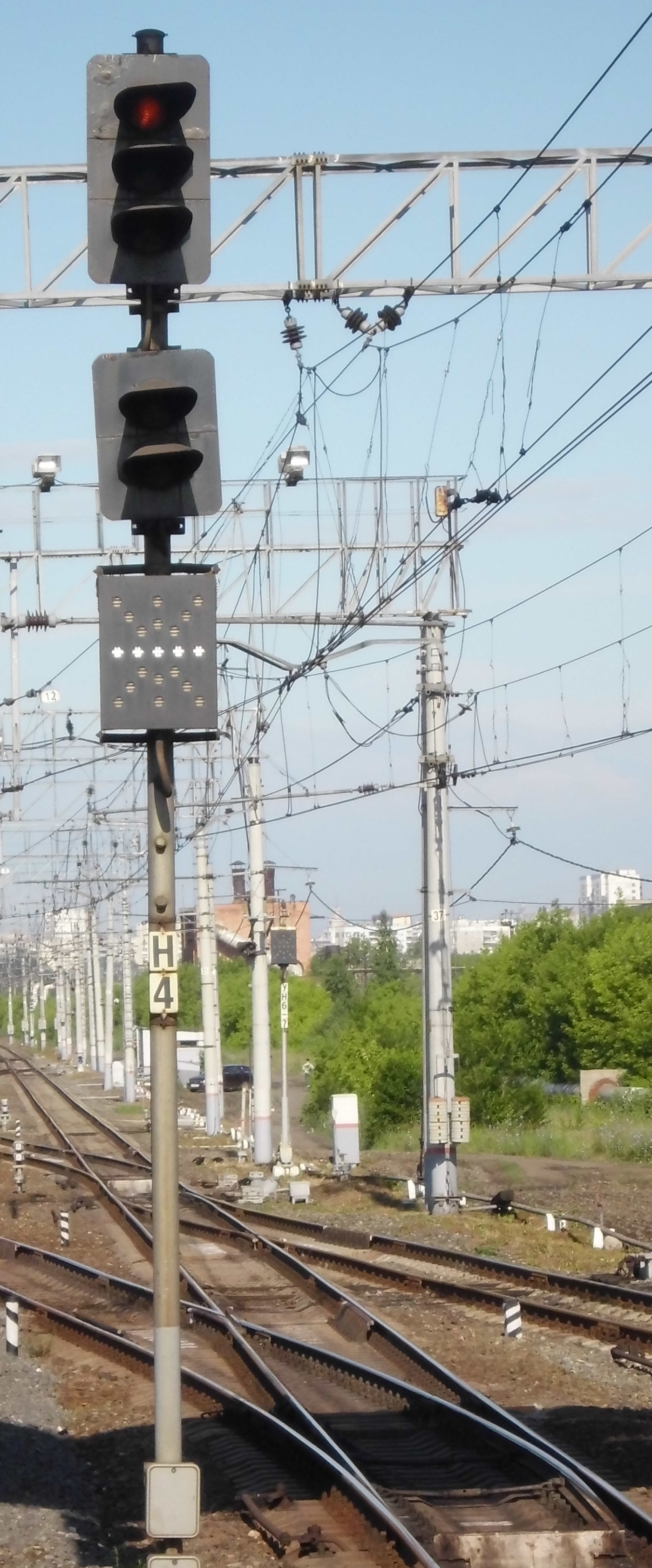 Выходной светофор нечётного направления с маршрутным указателем направления. Включены жёлтый сигнал светофора и направление на маршрутном указателе (движение на развязку с пересечением главного пути). Россия.